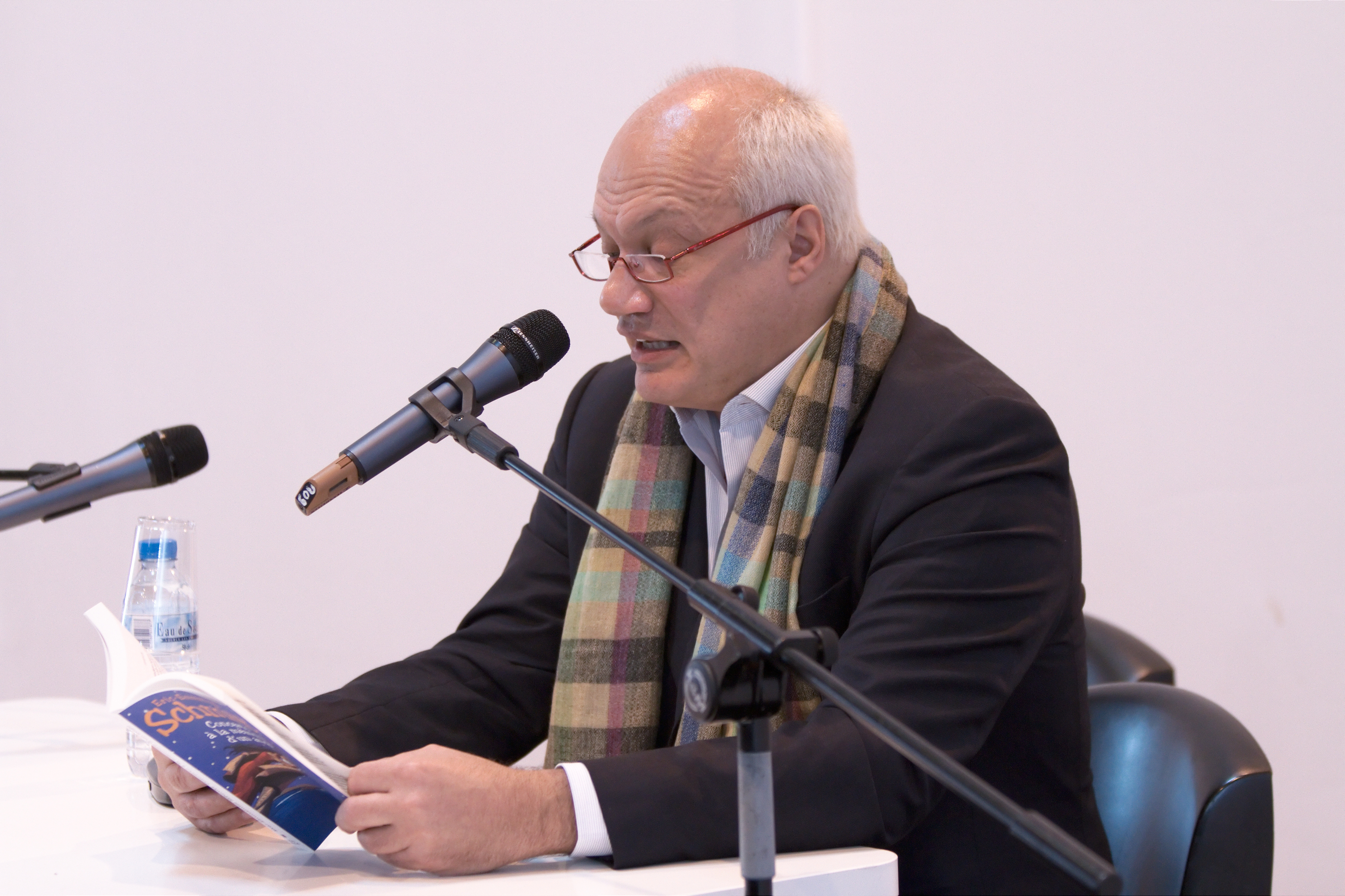 Éric-Emmanuel Schmitt au Salon du livre de Paris pour une lecture de la nouvelle Le Retour, extraite de son recueil Concerto à la mémoire d'un ange (éd. Albin Michel).